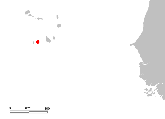 CV Fogo.PNG (Cape Verde)